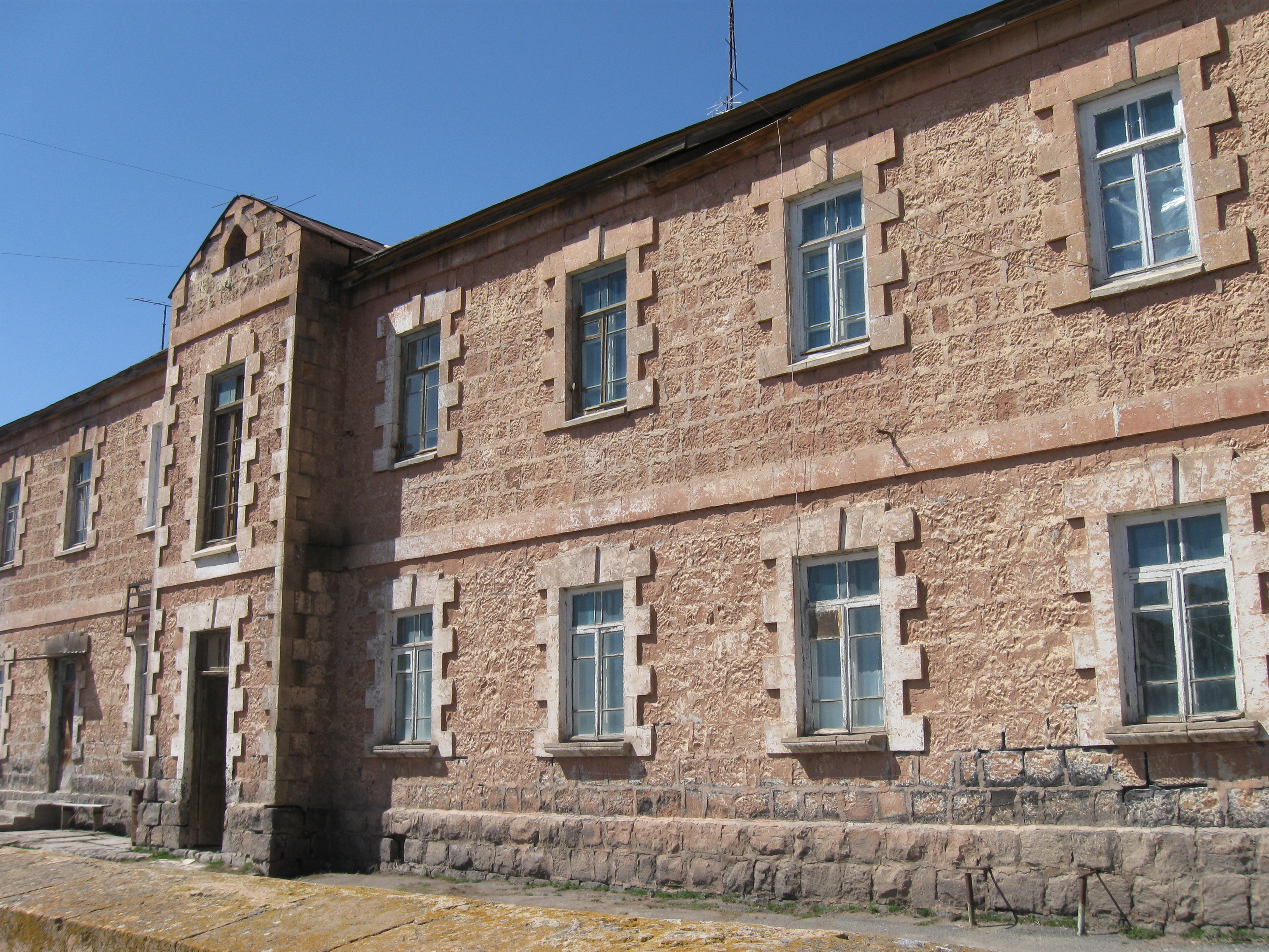 Անիպեմզա գյուղ